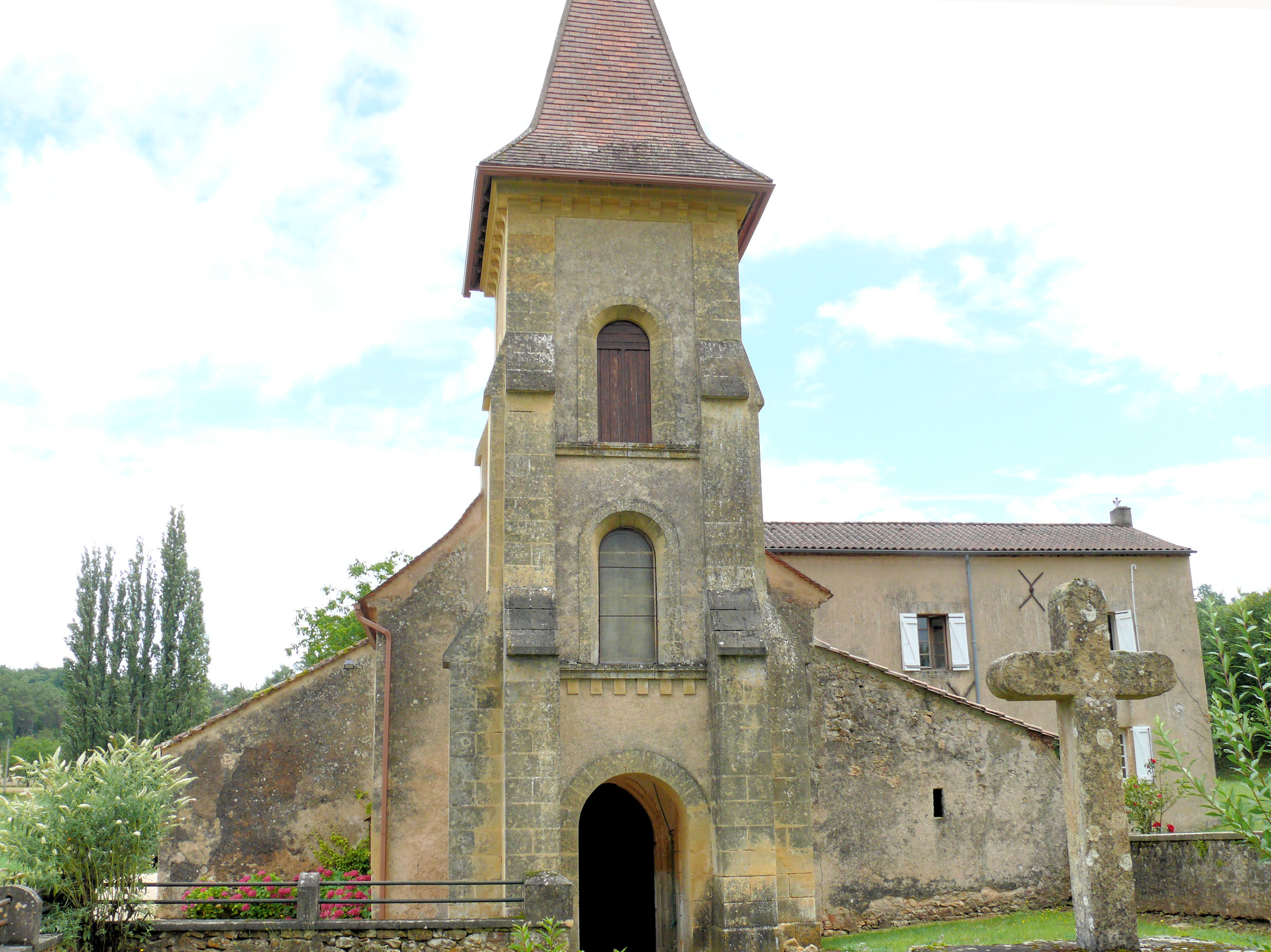 Saint-Amand-de-Belvès - Eglise Saint-Amand - Clocher-porche